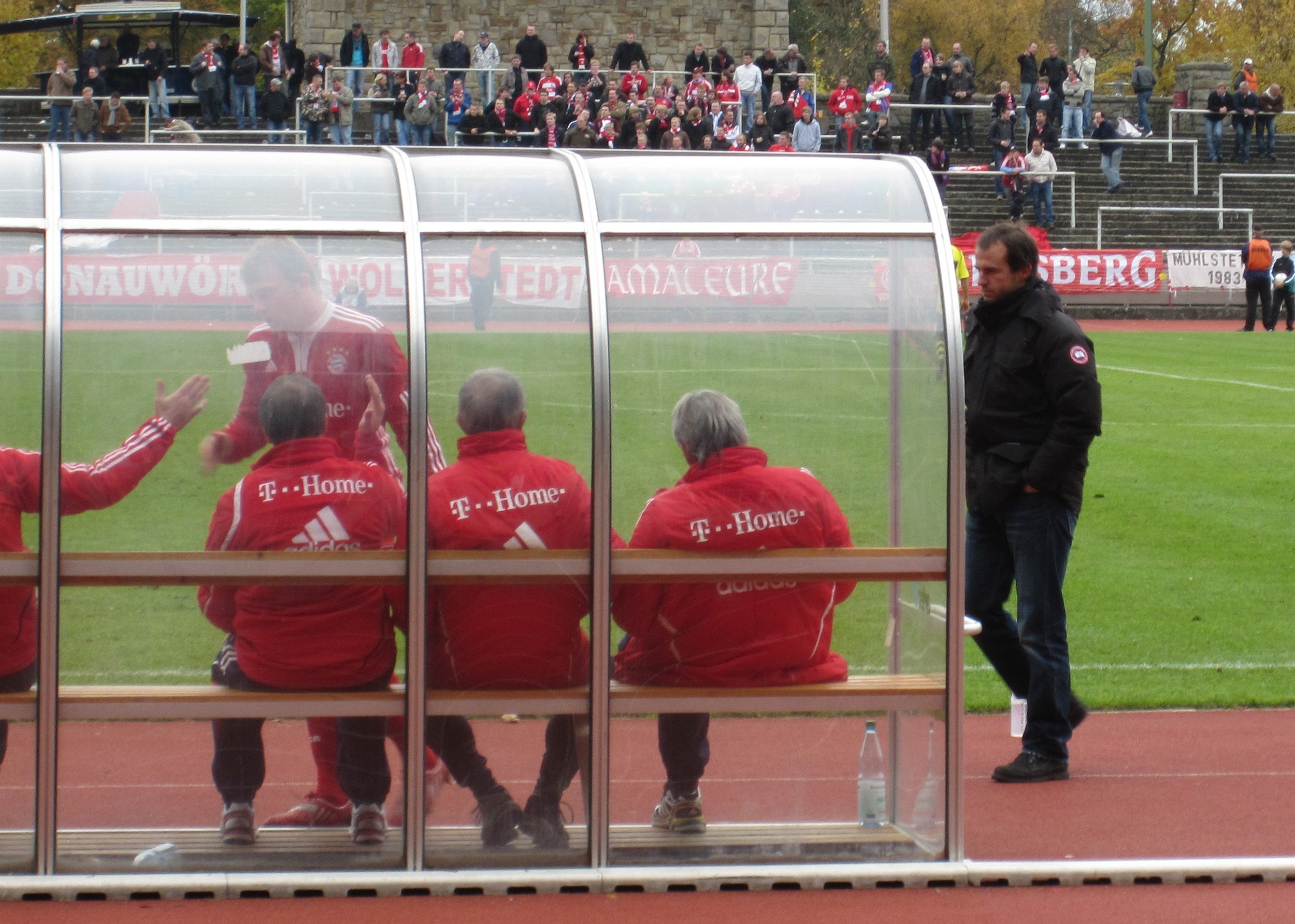 Mehmet Scholl als Trainer der 2. Mannschaft des Vereins Bayern München im Stadion Rote Erde in Dortmund. Das Spiel gewannen die Bayern mit 2:0.